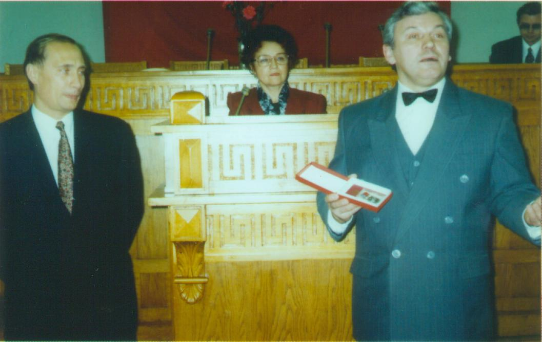 Член правительства Санкт-Петербурга, председатель комитета по внешним связям Владимир Владимирович Путин вручает Геннадию Егорову удостоверение почетного звания Заслуженный работник культуры РФ